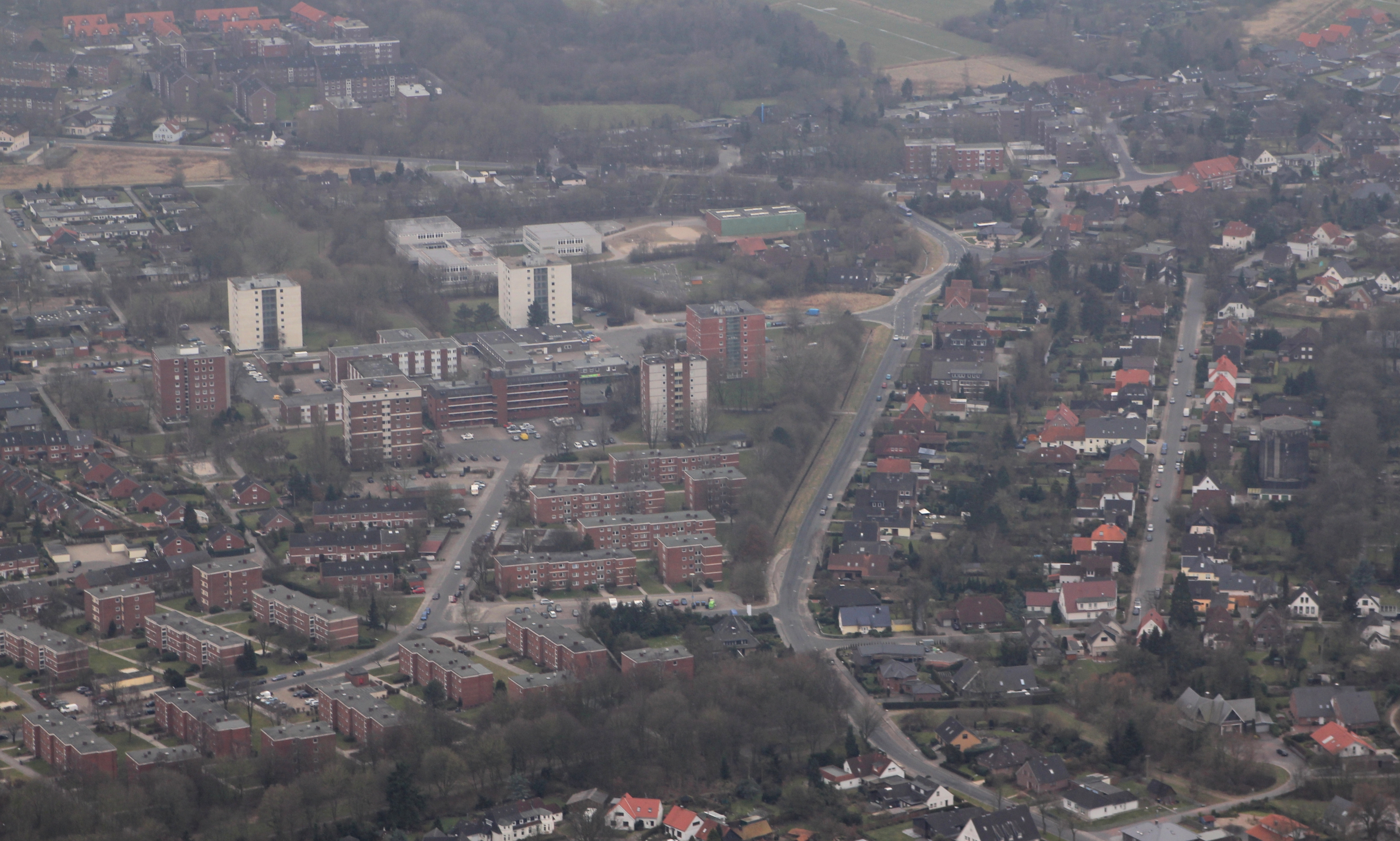 Ein Luftbild des südlichen Teils des Wilhelmshavener Stadtteils Aldenburg, von Norden aus aufgenommen. Die breite Straße in der Bildmitte ist der Altengrodener Weg, rechts davon befindet sich die parallel verlaufende Bentinckstraße, diese beiden Straßen werden im Vordergrund durch die Maadestraße verbunden. Die Reihe hoher Bäume am rechten Bildrand steht bereits auf dem Friedhof Aldenburg. Die alte Maade (mittlerweile nur ein kleiner Graben) fließt zwischen den Grundstücken der Bentinckstraße und des Altengrodener Wegs entlang, unterquert die Maadestraße, schlägt dann sofort einen 180°-Bogen nach links und verlässt das Bild am rechten Bildrand dort, wo die weißen Häuser zu erkennen sind, um durch das Gelände des Friedhofs wieder Richtung Süden zu fließen. Auf dem Bild erkennt man gut die historische Entwicklung des Stadtteils: Die aus Villenbebauung ab 1909 entstandene "Keimzelle" Aldenburgs mit ihrer Einfamilienhausstruktur befindet sich auf der rechten Seite des Altengrodener Wegs, im Gegensatz dazu stehen die in den 1960ern hochgezogenen Mehrfamilien-Reihenhäuser bzw. Wohntürme auf dessen linker Seite, die zum Stadtviertel (Aldenburg-)Wiesenhof gehören. Die Häuser am unteren linken Bildrand gehören zum Stadtviertel (Aldenburg-)Stadtparkkolonie. Die hellgrauen Flachbauten weiter hinten bilden die Grundschule Wiesenhof, das grüne Gebäude ist deren Sporthalle. Die Häuser in der linken oberen Ecke gehören bereits zum Stadtviertel Neuende-Europaviertel, die in der rechten oberen Ecke zum Stadtteil Schaar. Dieses Bild entstand während des Fotoflugkurses 2013.